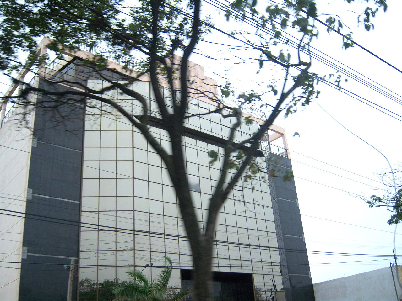 Edificio sobre la Av. Mcal. López.